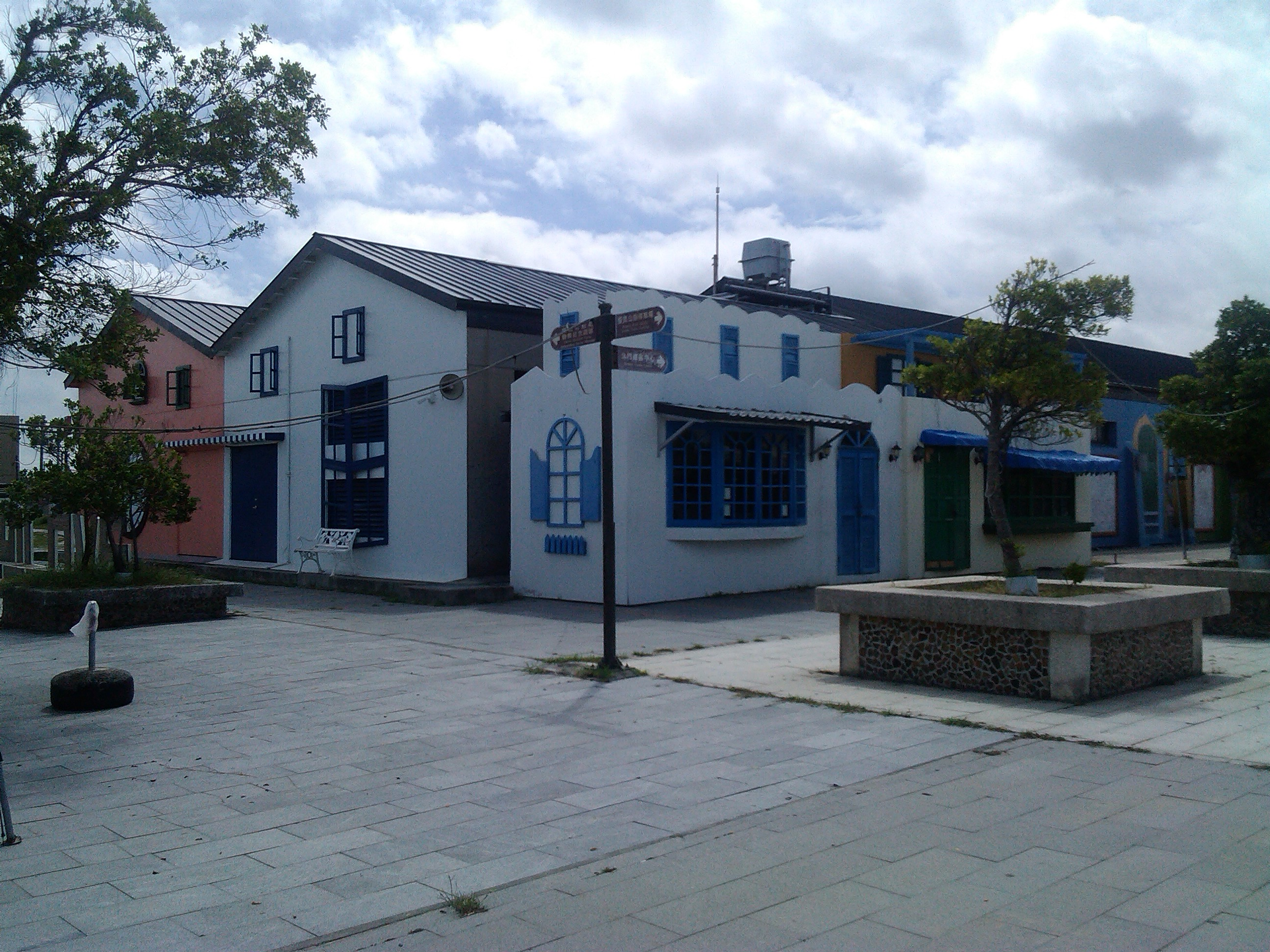 具南歐聖托里尼風格的建築物